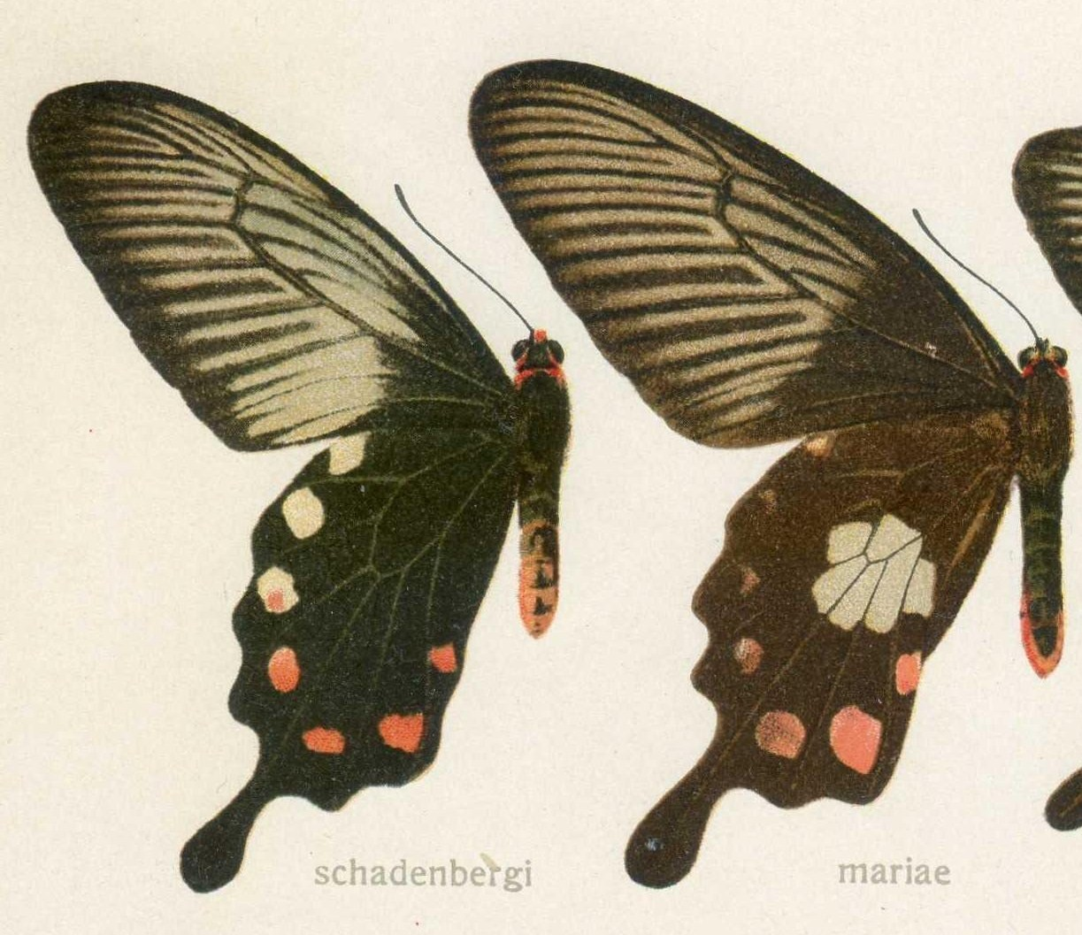 Papilio schadenbergi Semp. f. schadenbergi Semp. = Atrophaneura schadenbergi schadenbergi (Semper, 1891), upperwing Papilio mariae Semp. f. mariae Semp. = Atrophaneura mariae mariae (Semper, 1878), upperwing